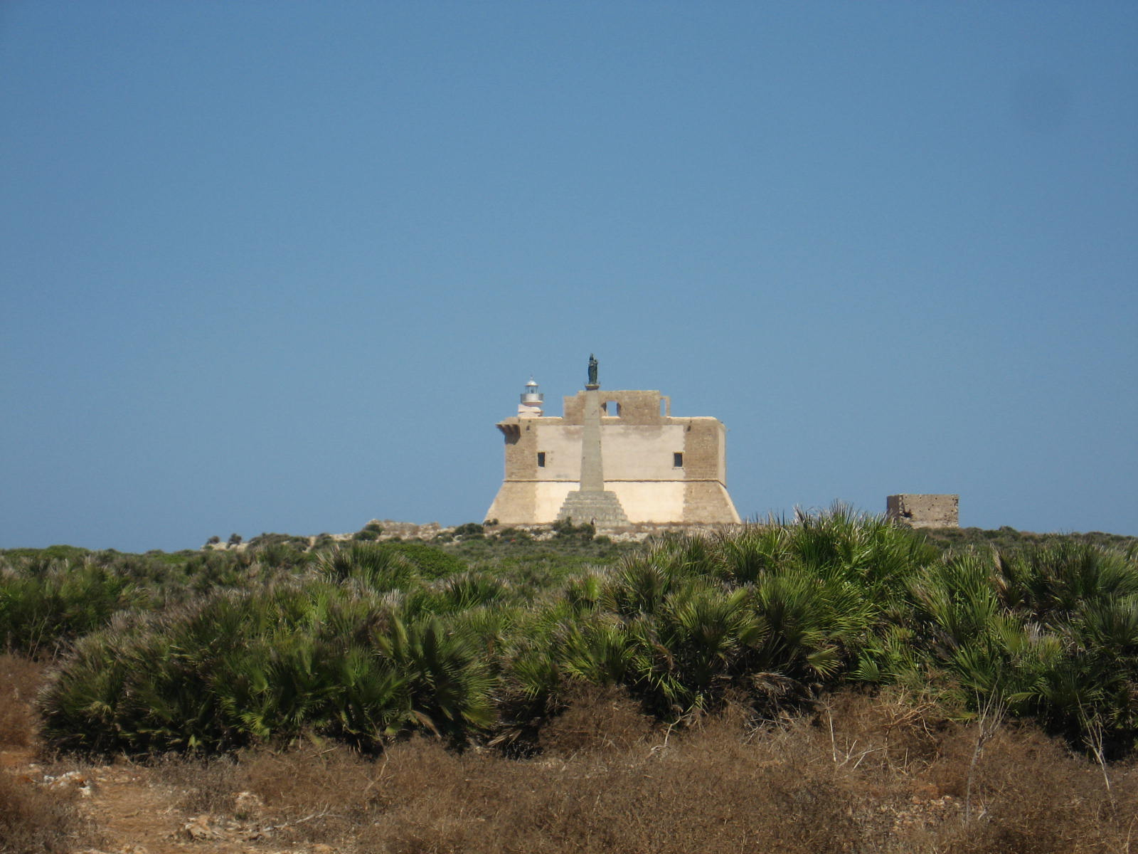 Paricolare della fortezza.